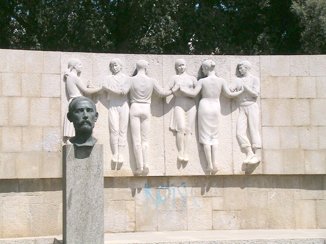 Monument a Pep Ventura, Plaça del president Josep Tarradellas a Figueres (Girona, Catalunya, Espanya)